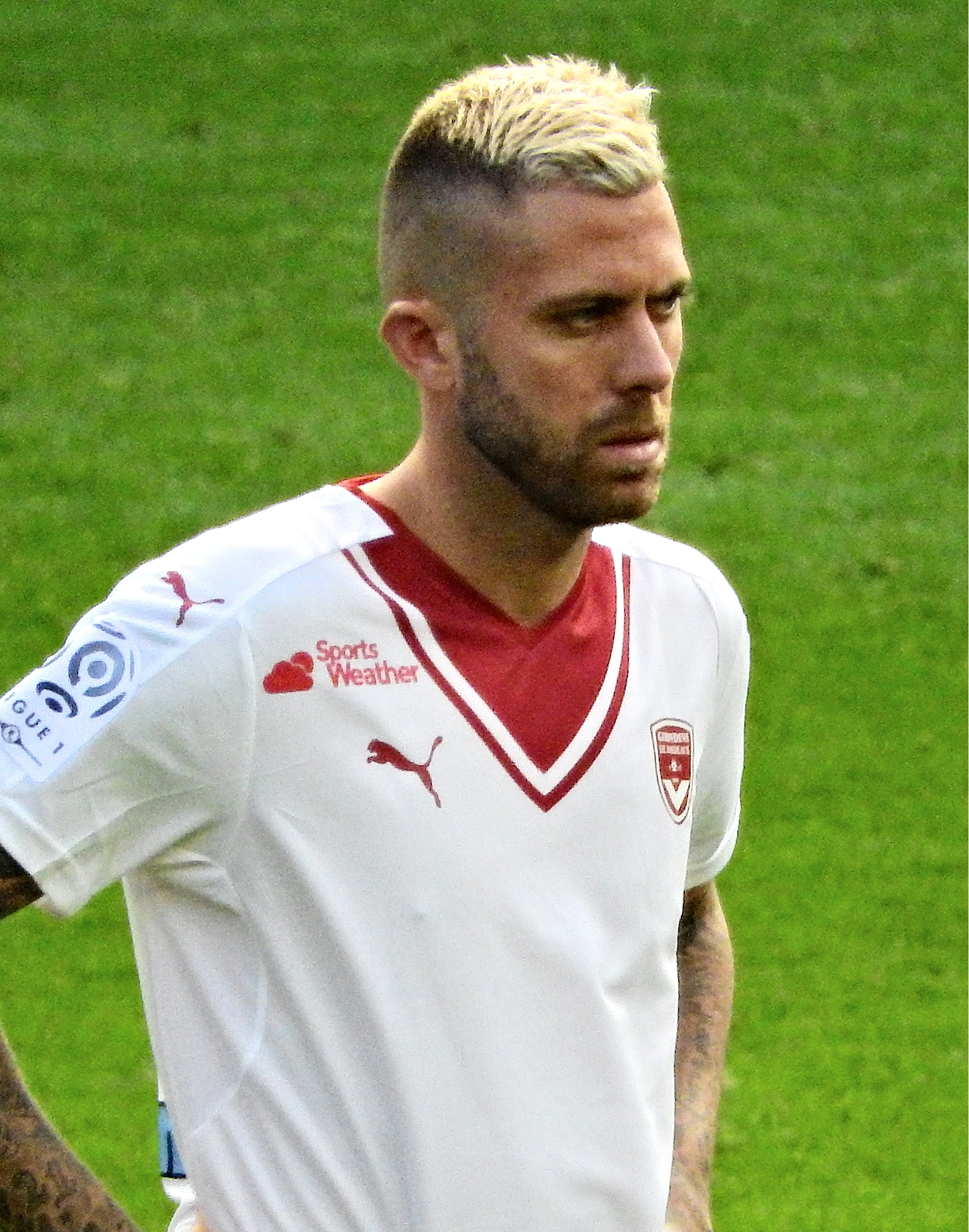 Jérémy Ménez con el Burdeos.